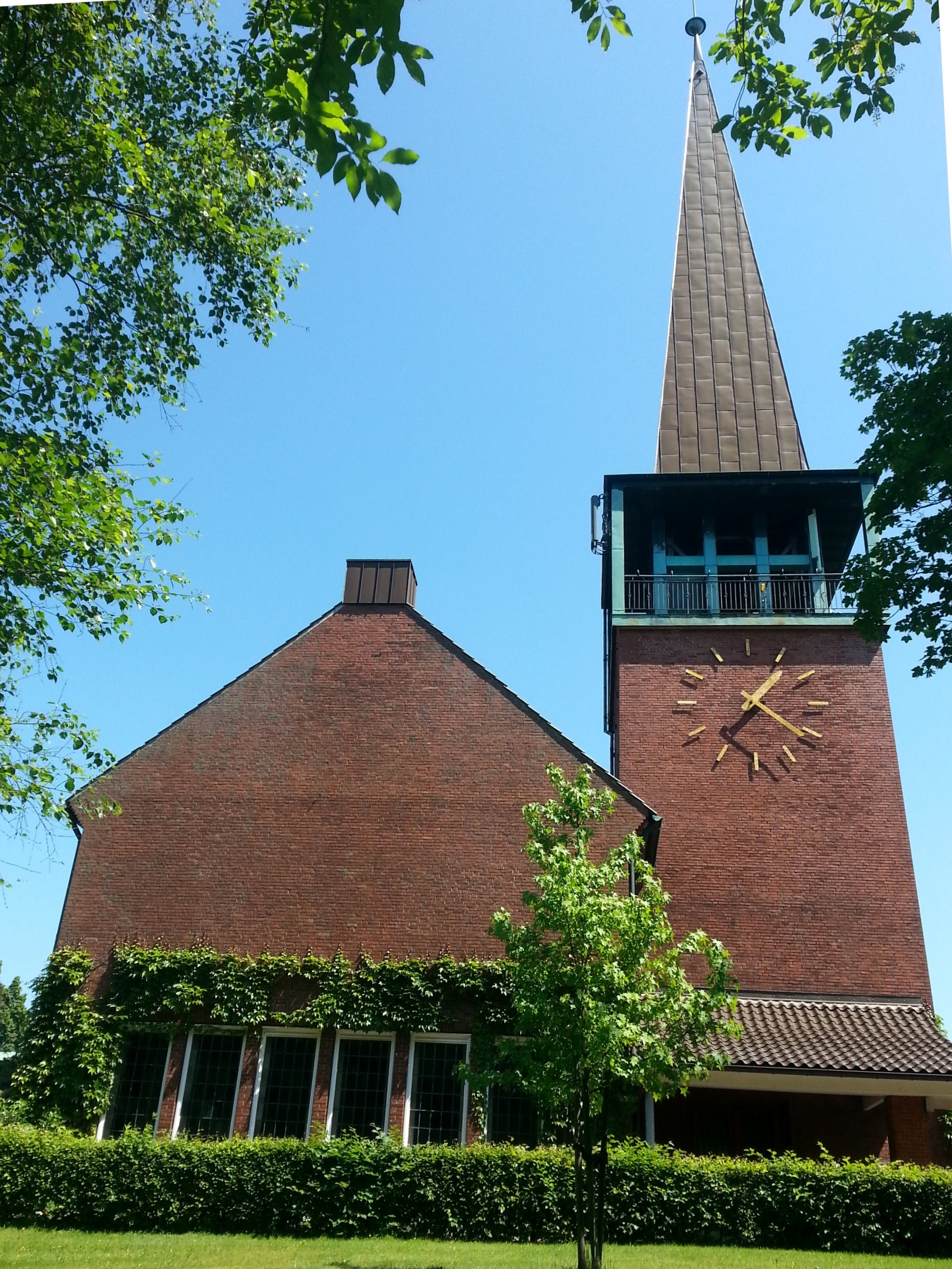 The John the Apostle Church in Stade, Lower Saxony, Germany. View from West.